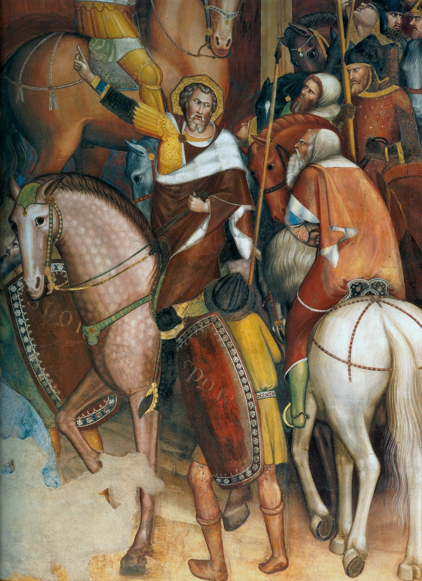 Липпо Мемми. Распятие, деталь. Фреска. Сан Джиминьяно. Колледжата Санта Мария Ассунта. 1330-50 гг.